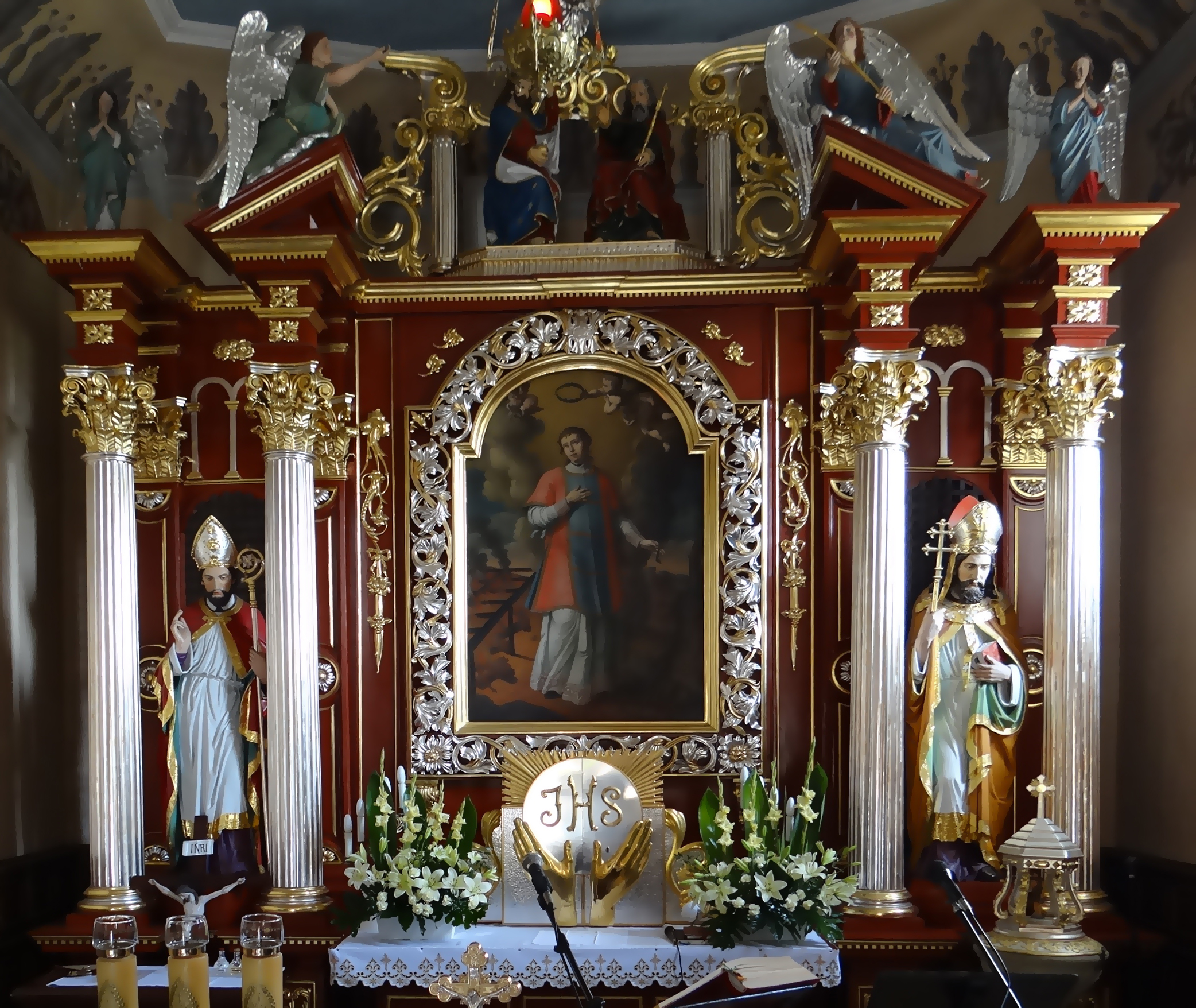 Powiat krakowski. Gmina Skawina wieś Radziszów. Kość św. Wawrzyńca, ołtarz główny.